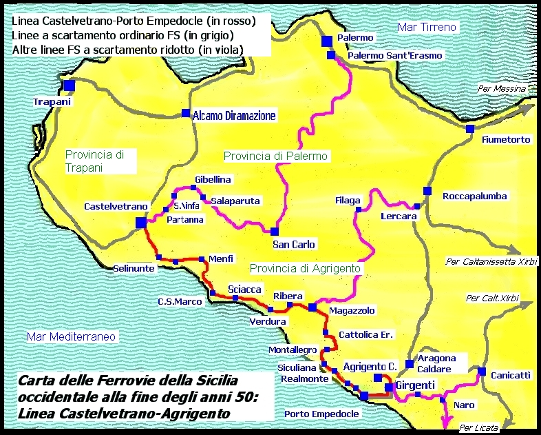 Mappa ferroviaria